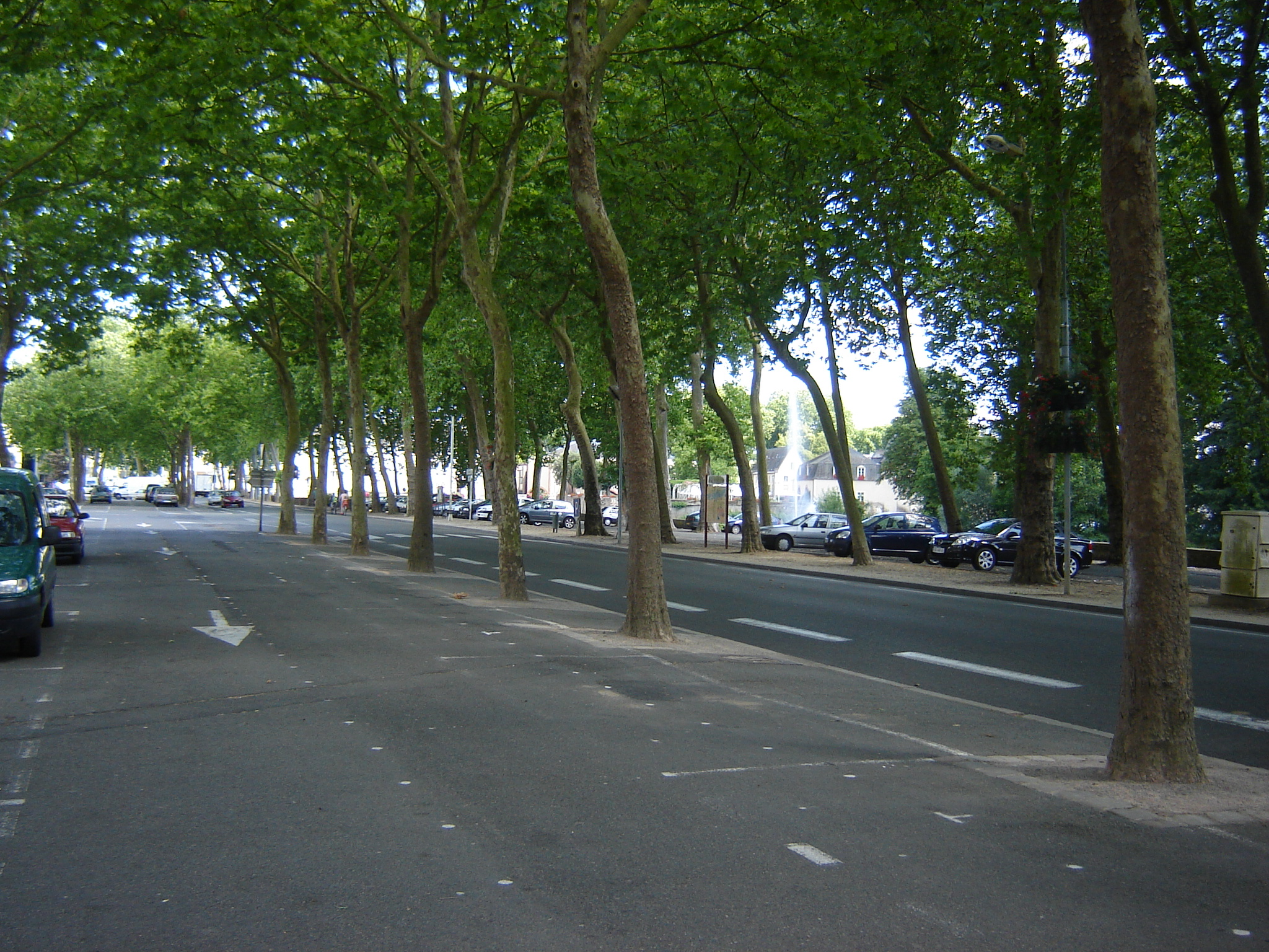 Vue de la Promenade Foch à , Sarthe, France